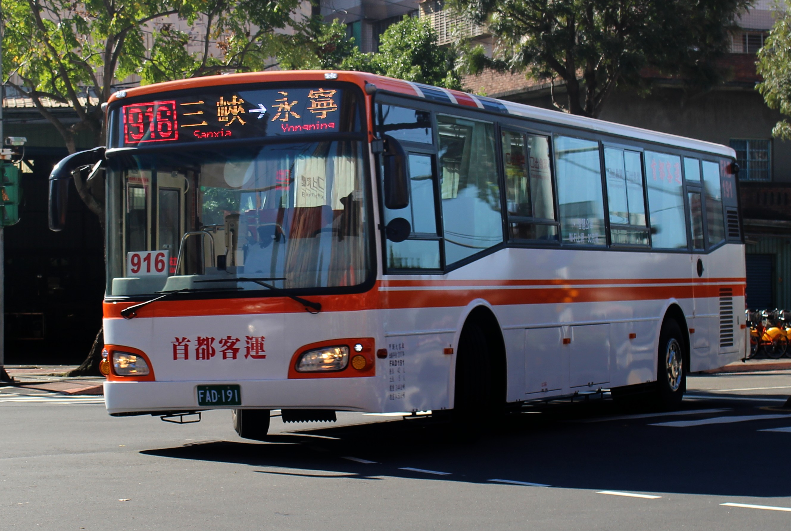 首都客運FAD-191行駛新北市市區公車916線